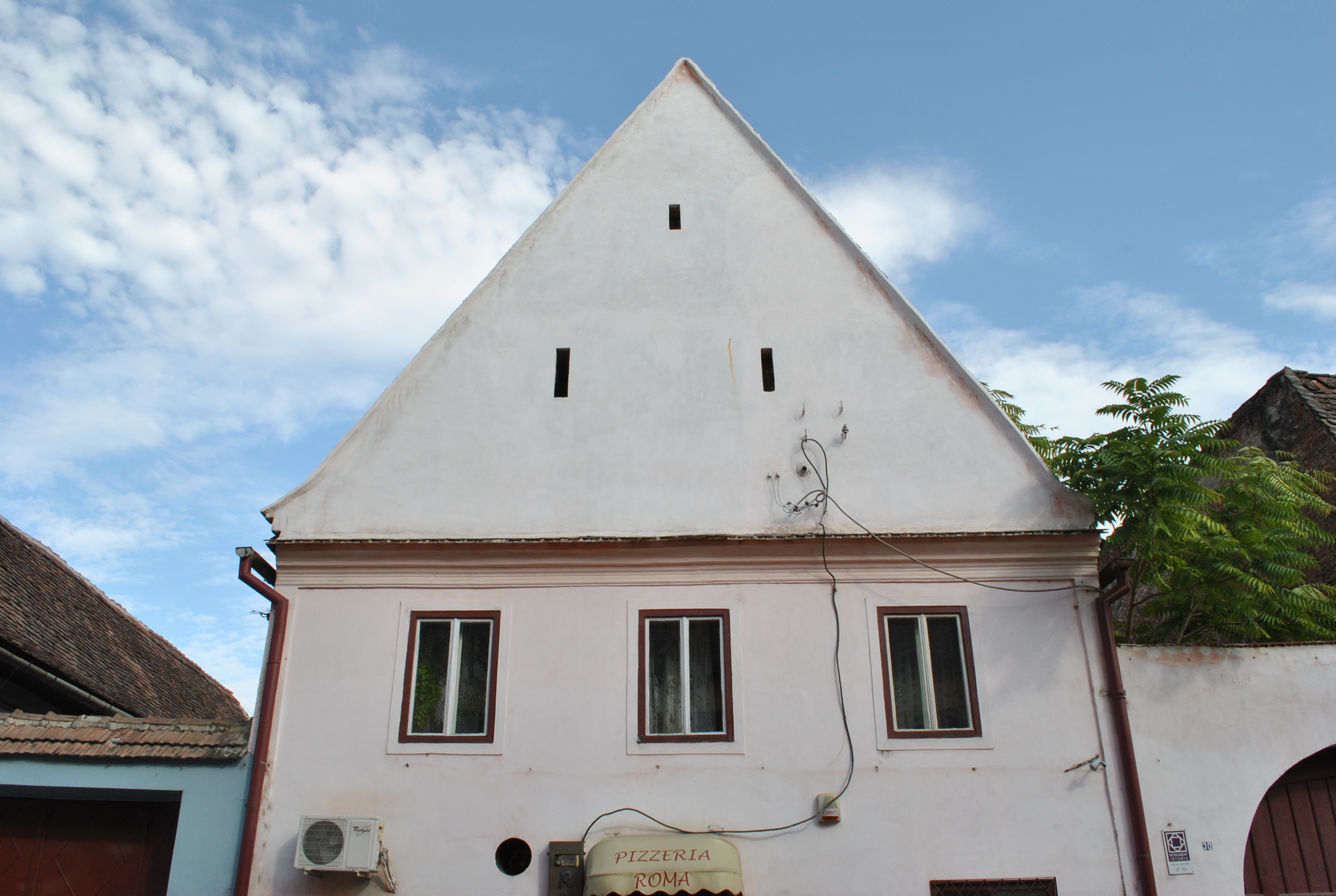 Casă, sec. XV - XVI, sec. XVIII